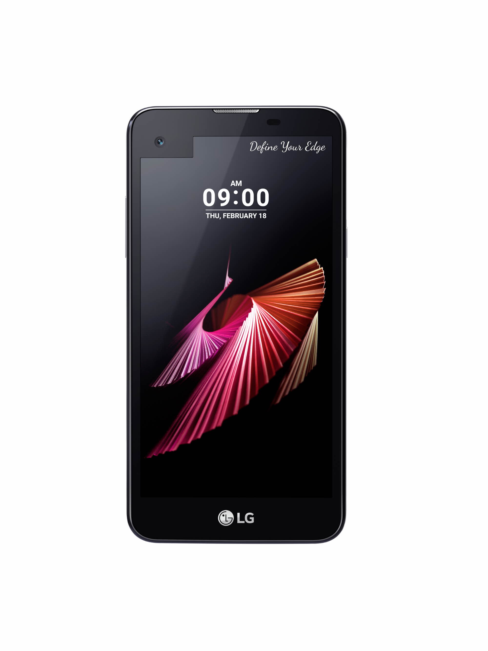 LG전자, 보급형 스마트폰 ‘X 시리즈’ 'MWC 2016'서 공개 ■ ‘듀얼 카메라’ 탑재한 ‘X 캠’, ‘세컨드 스크린’ 채택한 ‘X 스크린’ 등 2종 선보여 ■ 프리미엄 기능 갖춘 하드웨어 적용해 프리미엄급 사용자 경험 제공 ■ 앞서 출시한 ‘K 시리즈’와 함께 중저가 스마트폰 시장 적극 공략 ※ Social LG전자 ( 에서 관련 보도자료를 확인하실 수 있습니다.